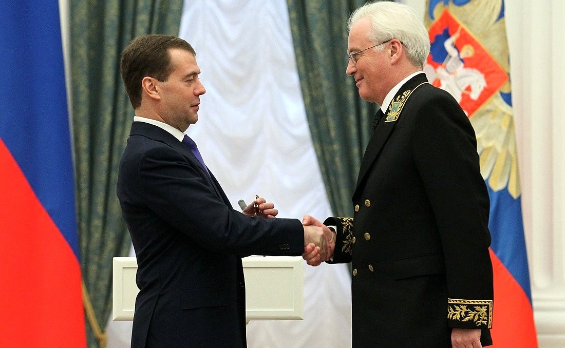 Дмитрий Медведев на церемонии вручения государственных наград. Орденом «За заслуги перед Отечеством» IV степени награждён постоянный представитель России при Организации Объединенных Наций в Нью-Йорке Виталий Чуркин